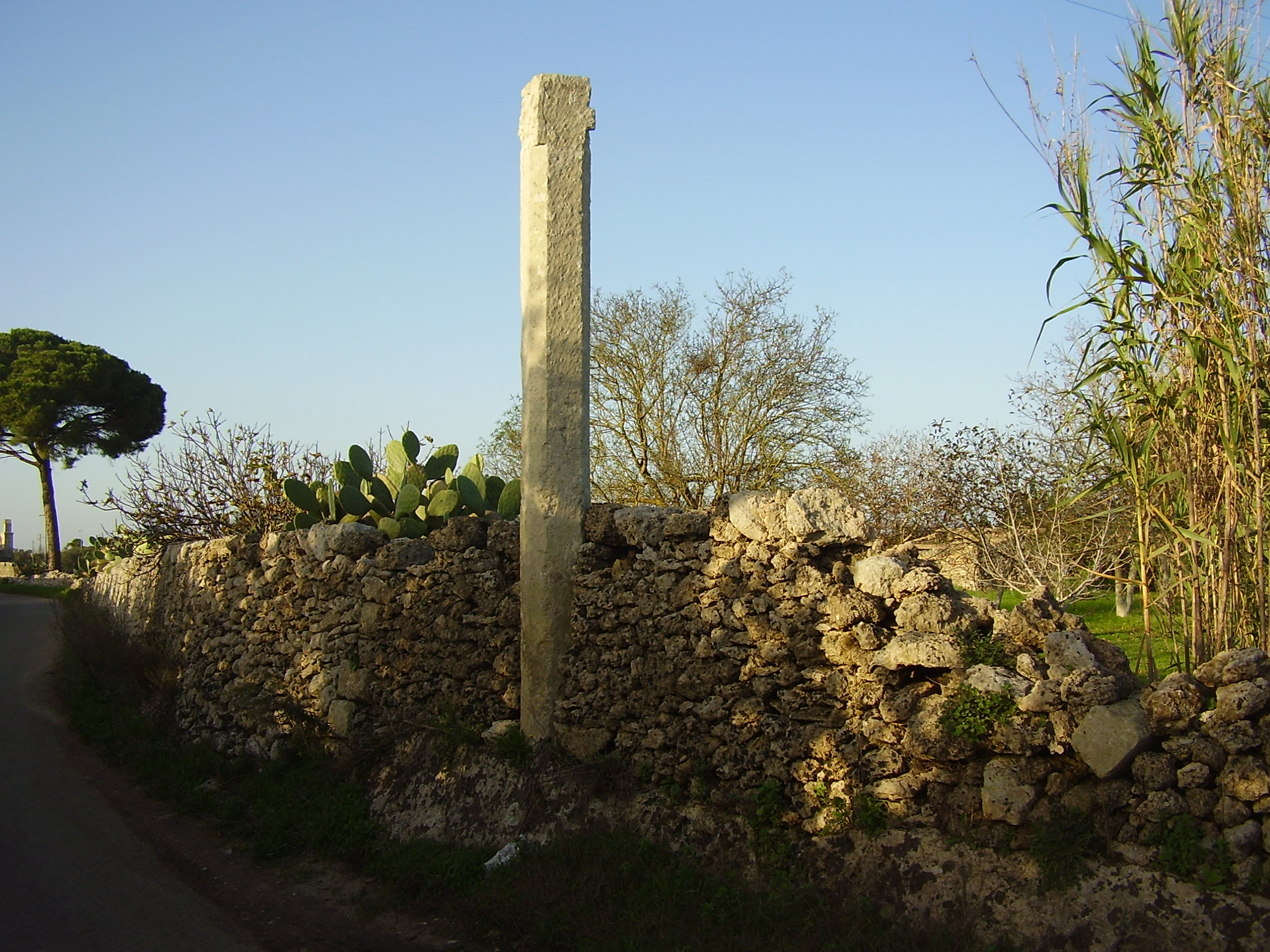 Menhir La Cupa2 Scorrano, Lecce